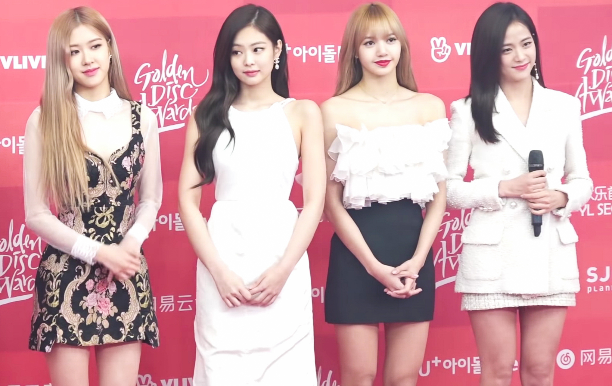 20190106 (NEWSEN) 블랙핑크 (BLACKPINK), 수줍은 많은 소녀지만 돋보이는 아름다운 미모 (Glden Disc Awards 2019)